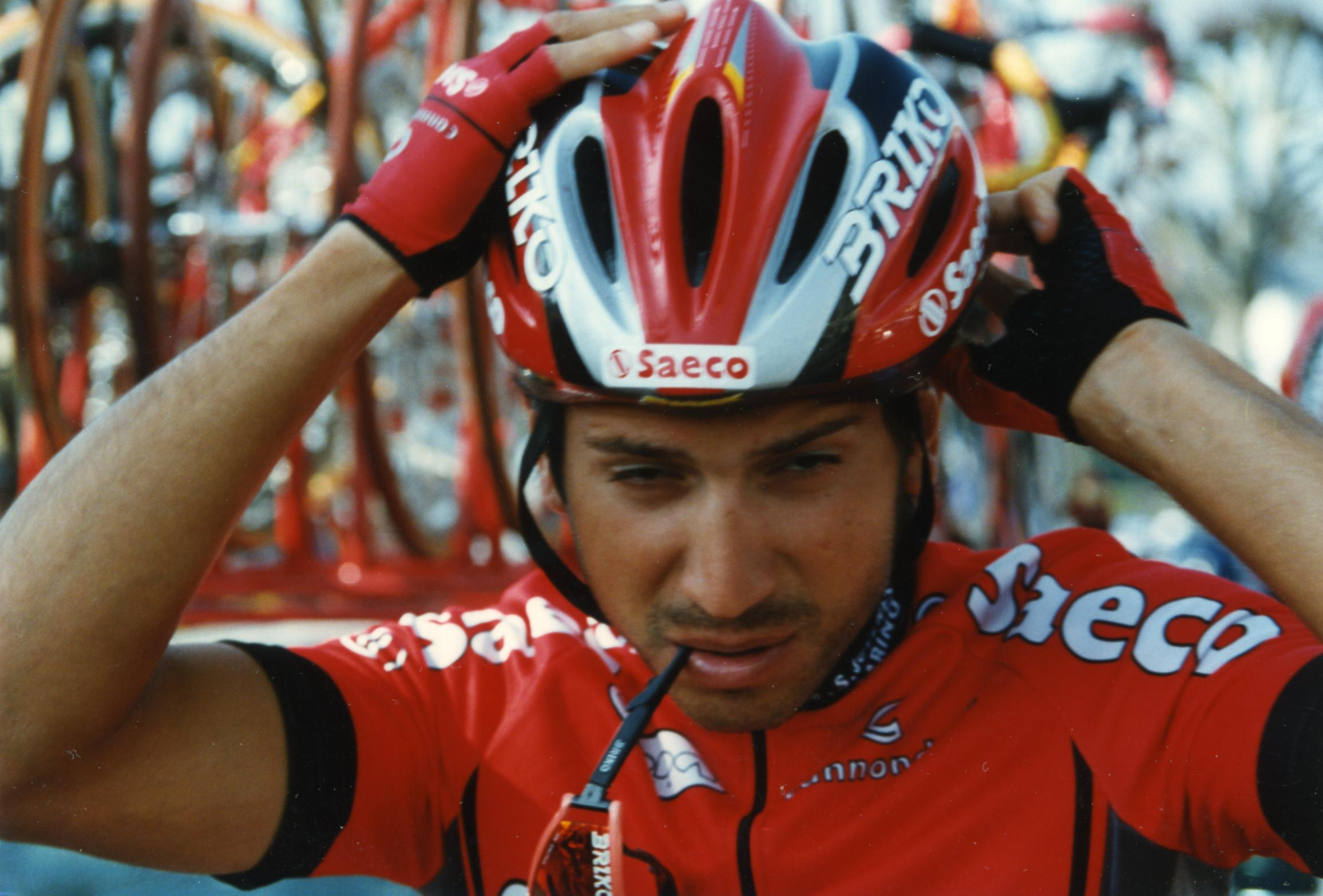 PARIS-NICE 1997